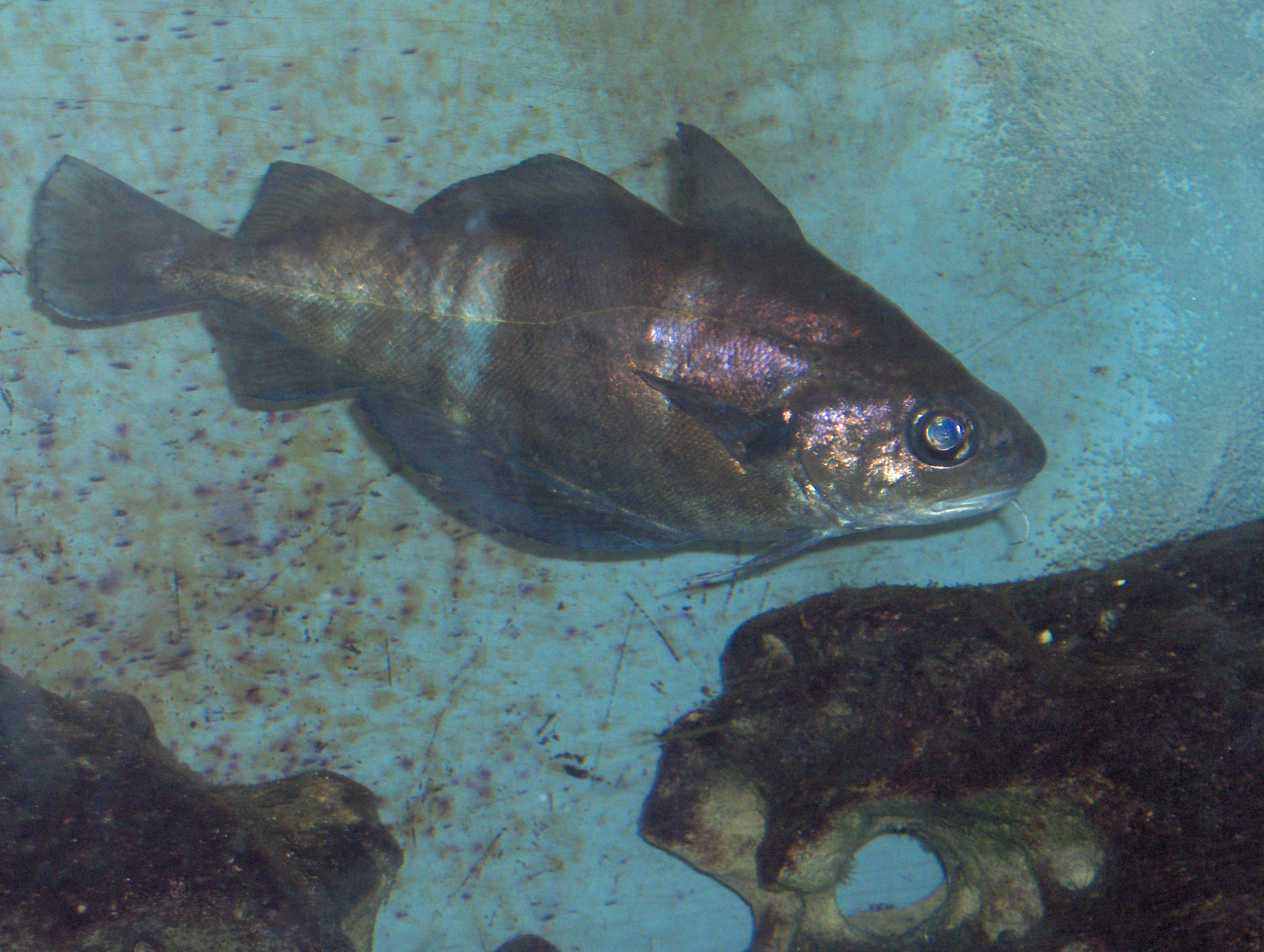 Trisopterus luscus